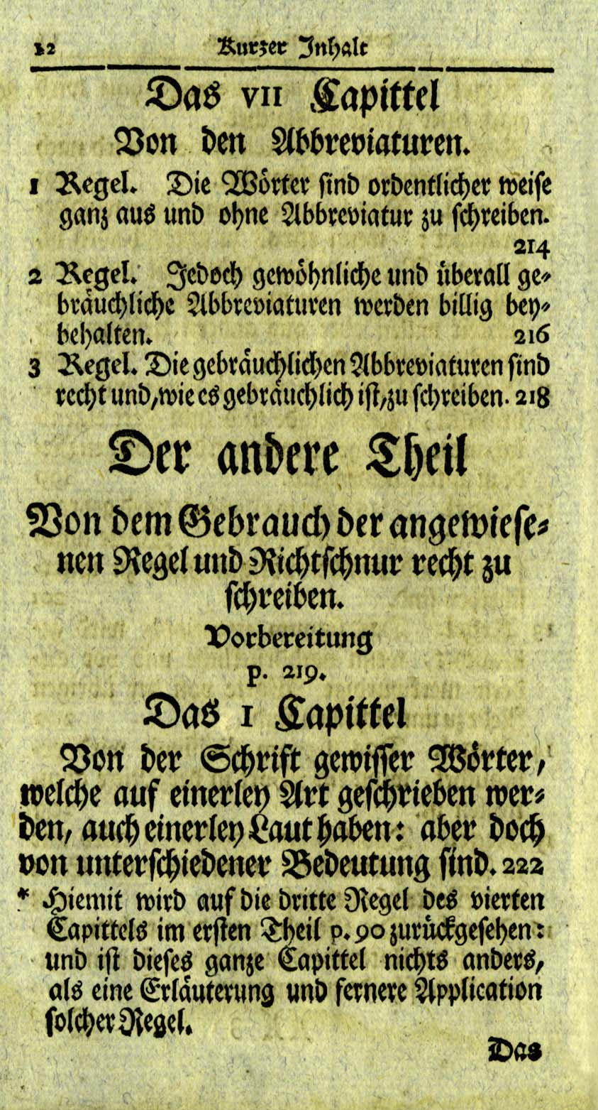 Hieronymus Freyer: Anweisung zur Teutschen Orthographie. Halle 1746. Inhalt 12